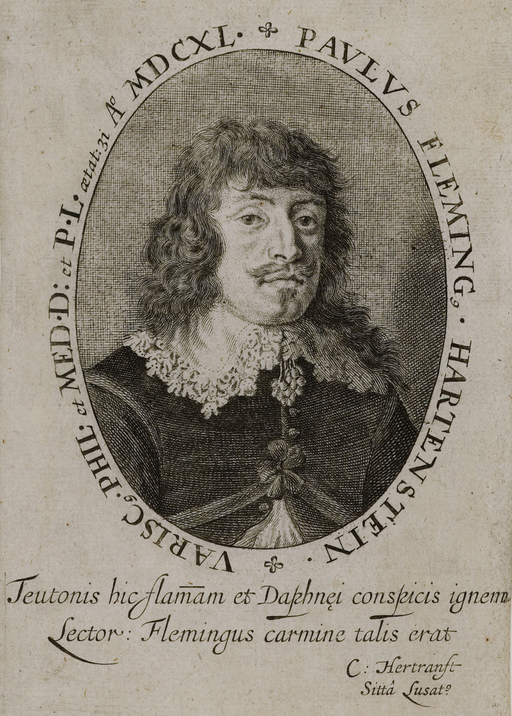 Bildnis von Paul Flemming